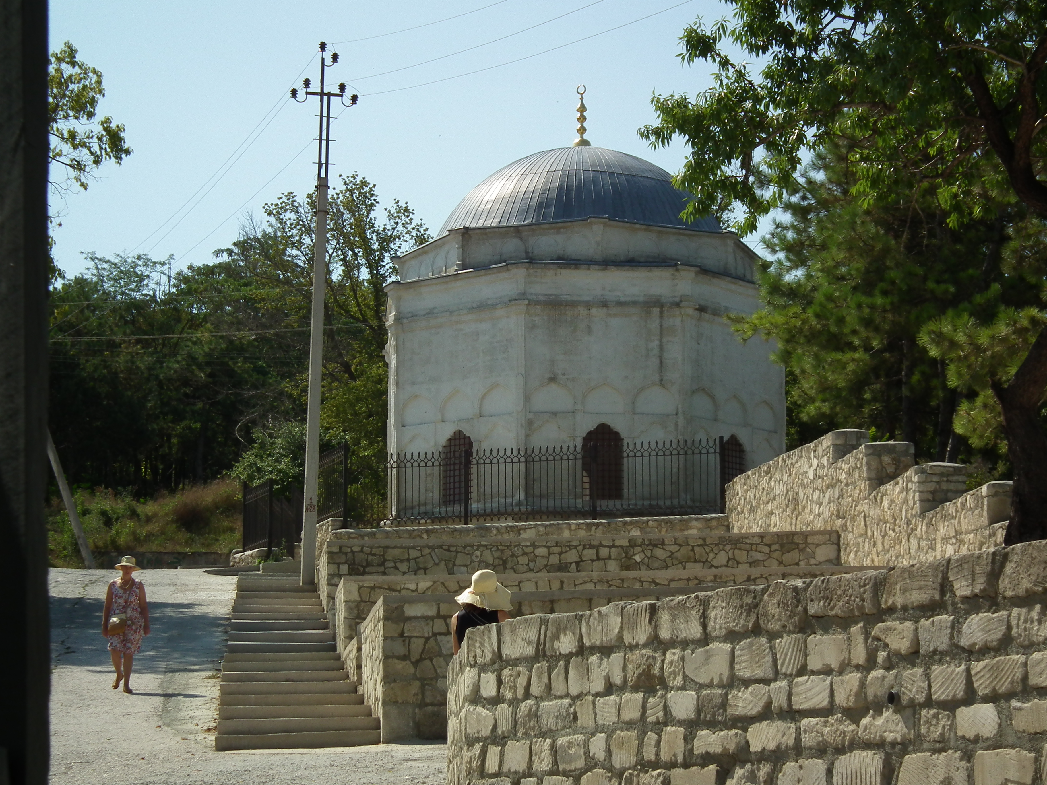 Гробниця «Дюрбе Діляри-Бікеч», Бахчисарай, вул. Річкова, 133